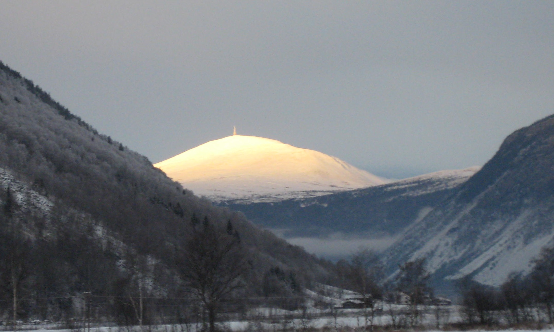 Horgenose 1429 moh. Med Jettasenderen på Blåhøe 1605 moh. stikkende opp like bakenfor.